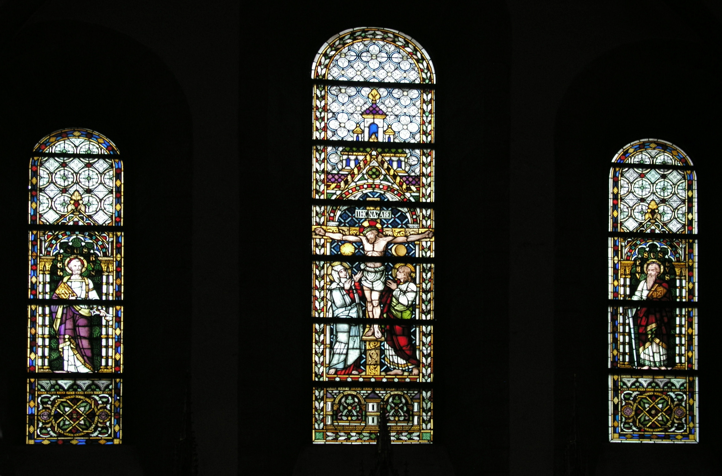 Cathedral Visby Sankta Maria / Visby Sankta Maria domkyrka